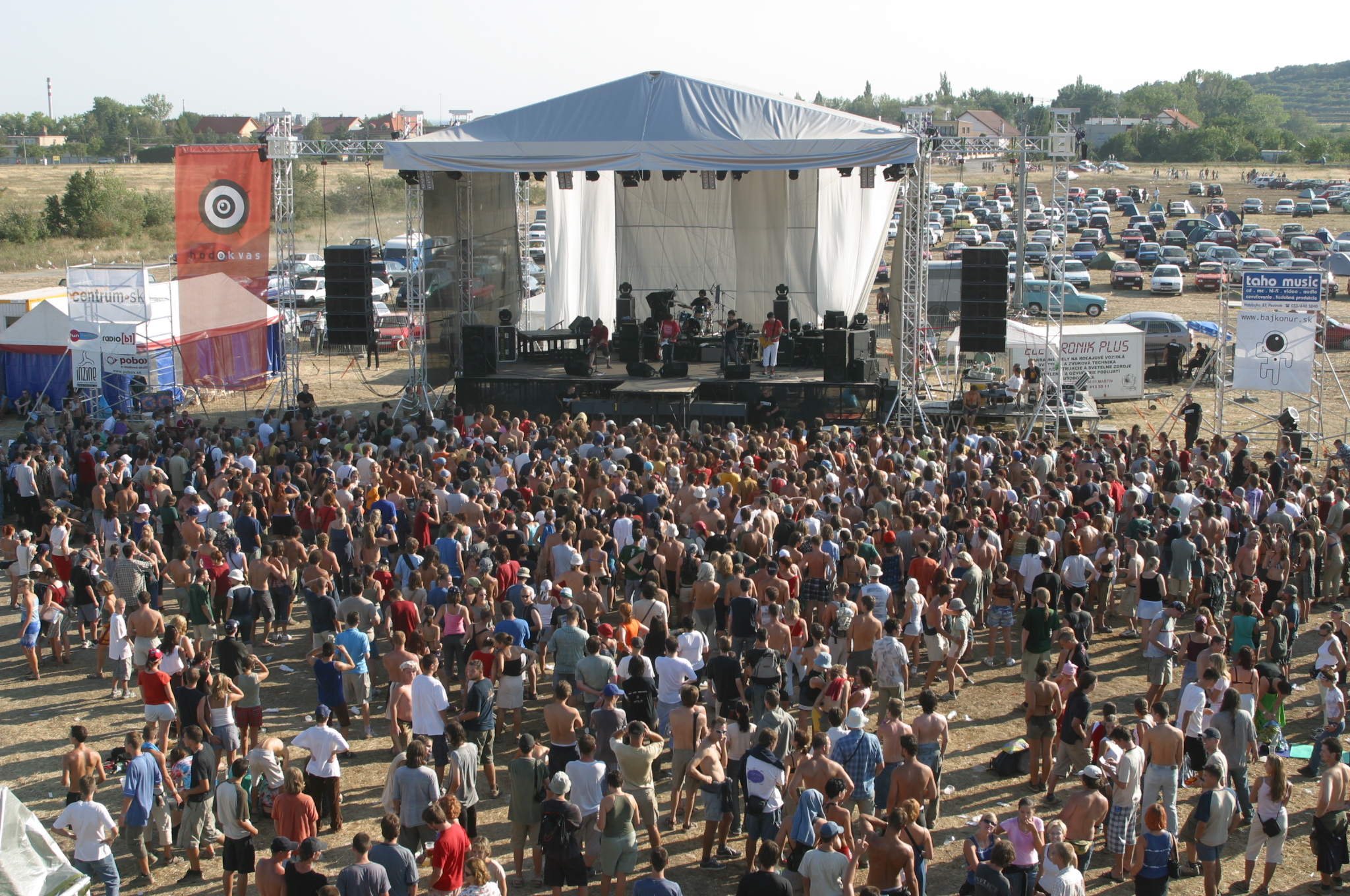 Hlavné podium festival Hodokvas Pezinok 2003